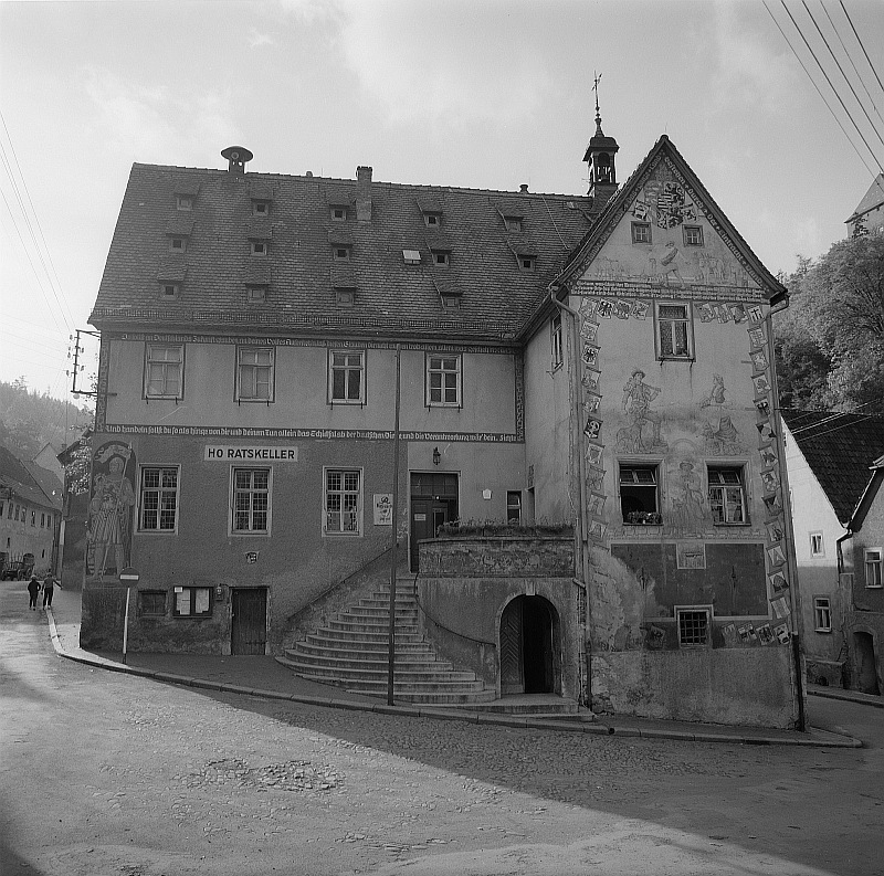 Original image description from the Deutsche Fotothek Ziegenrück. Ansicht vom Rathaus (1501/1600)